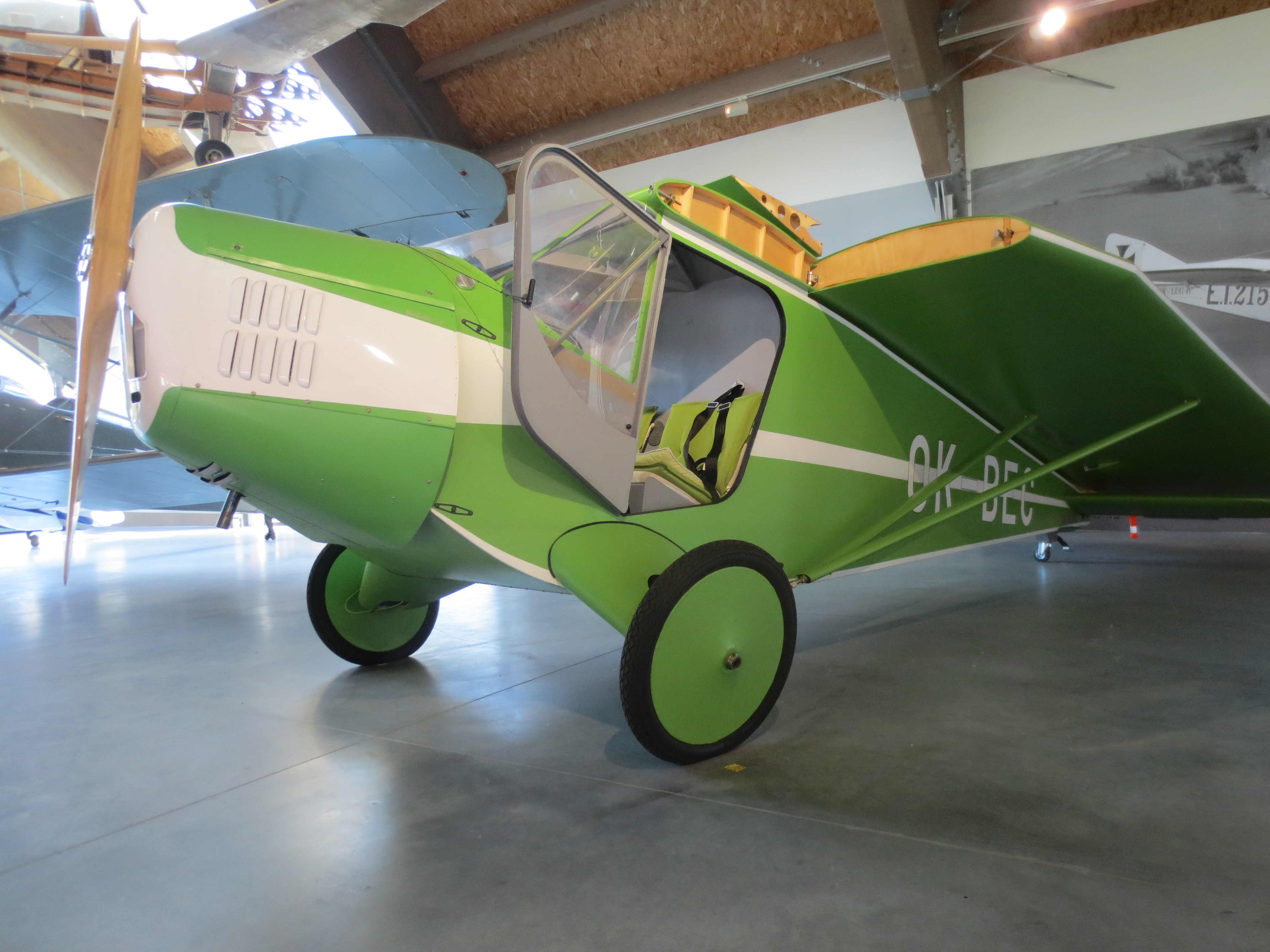 Replika Beneš-Mráz Be-60 Bestiola (1935), Letecké muzeum Mětoděje Vlacha Mladá Boleslav